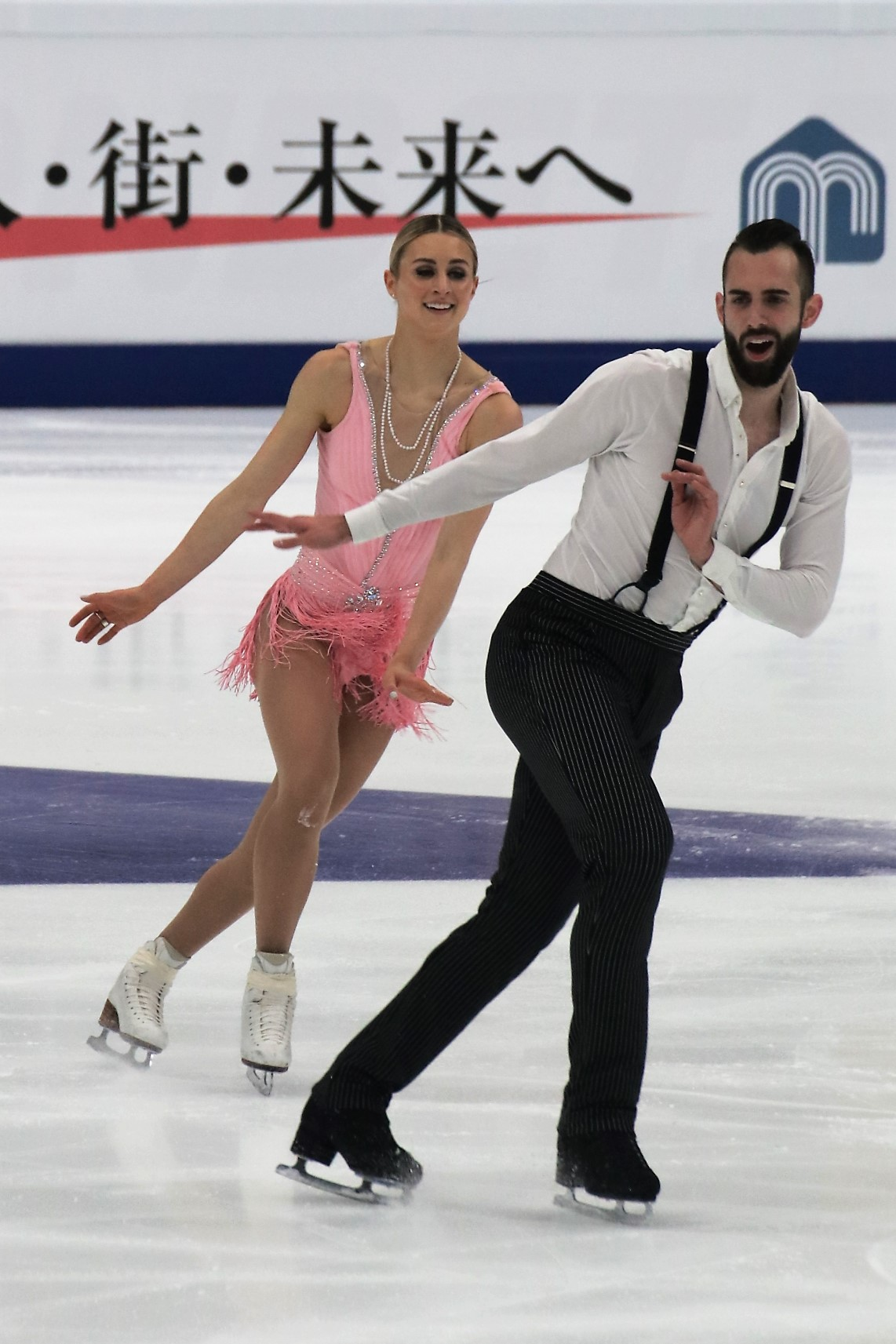 Эшли Кейн / Тимоти Ледук (США) на Rostelecom Cup 2018